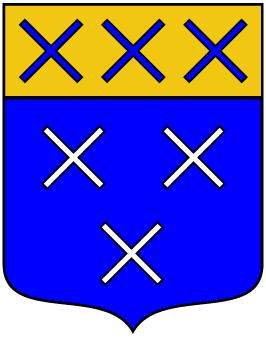 Blason de Balzac